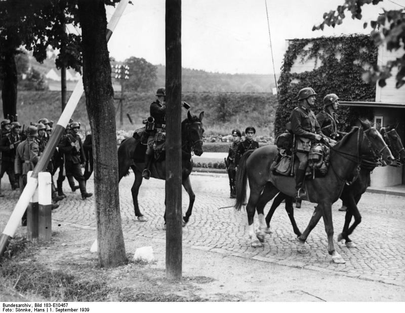 Polen, Schlagbaum, deutsche Soldaten Zentralbild, II.Weltkrieg 1939-1945 Überfall der faschistischen deutschen Wehrmacht auf Polen am 1.9.1939. Nach der Besetzung der Freien Stadt Danzig durch die Faschisten am 1.9. geht die Landespolizei der Stadt Danzig im Verband mit der deutschen Wehrmacht über die Danzig-polnische Grenze auf der Straße Zoppot-Gdingen (Gdynia) vor. [Scherl Bilderdienst] [Polenfeldzug, bei Danzig, Straße Zoppot-Gdingen.- Deutsche Soldaten beim Überqueren der deutsch-polnischen Grenze; hochgeklappter, unbeschädigter Schlagbaum mit polnischem Wappen [aus Serie mit mehreren (gestellten) Motiven: (1) Bild 183-E10457, (2) Bil]